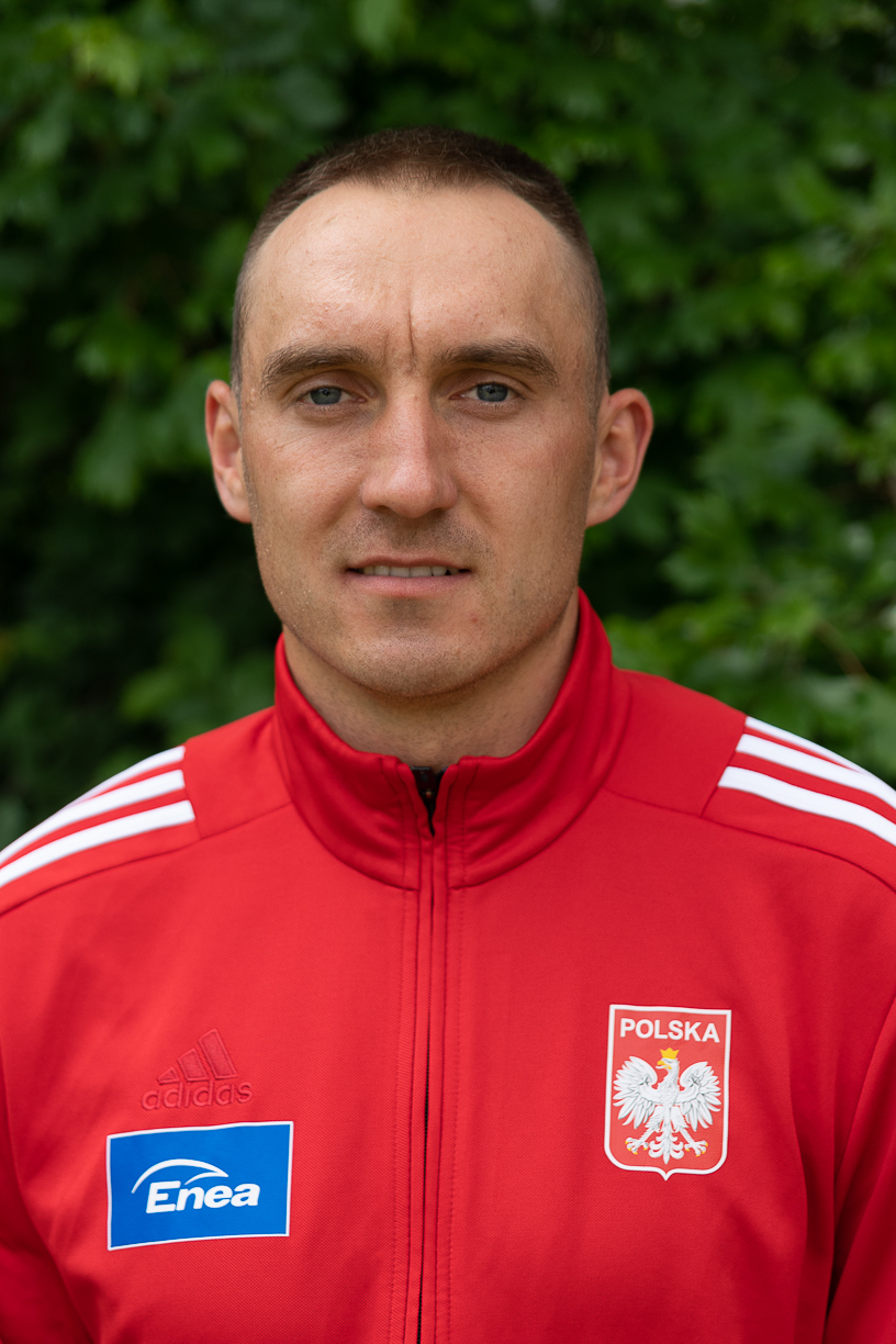 Polski wioślarz Mateusz Wilangowski 2019